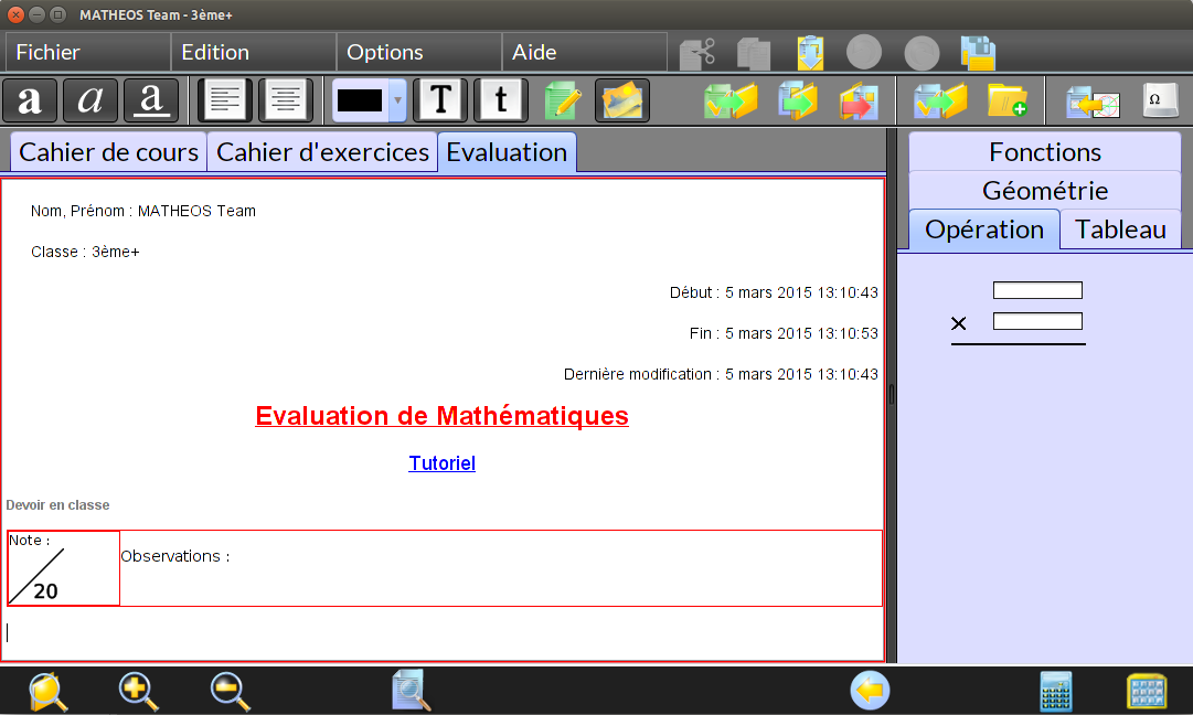 Présentation de l'onglet Evaluation de MathEOS